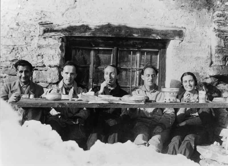 Antonio Rostagni, Gleb Wataghin, Enrico Persico, Enrico Fermi, Matilde Rostagni (Gressoney-La-Trinité, décembre 1932).